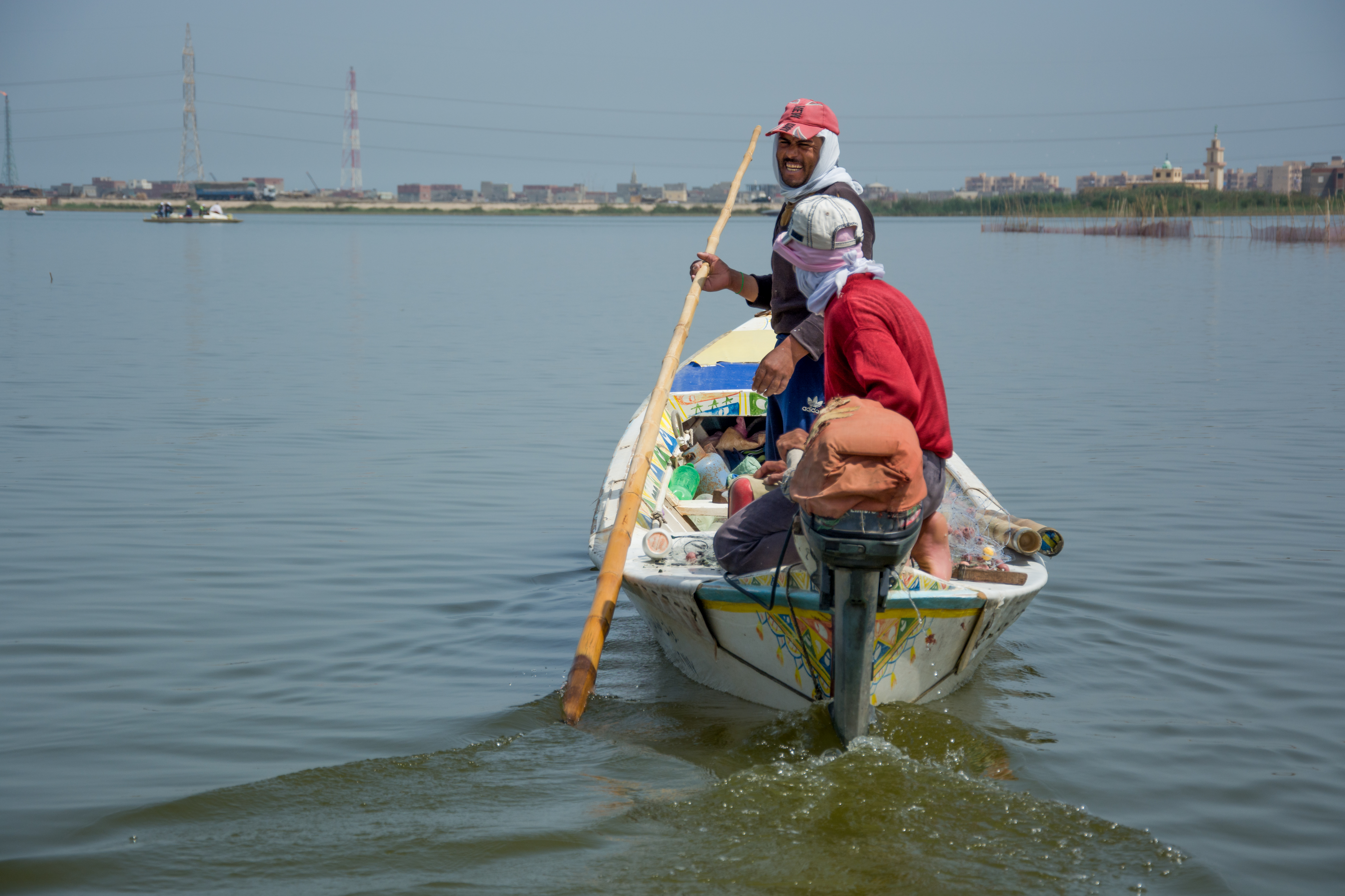 اثنان من صائدي الاسماك في بحيرة المنزله في مدينة بورسعيد المصريه اثناء ممارسة عملهم وعلى وجههم الابتسامه بعد يوم عمل وجمعهم حصيله الصيد متوجهين لمكان بيع اسماكهم This is an image of "African people at work" from Egypt